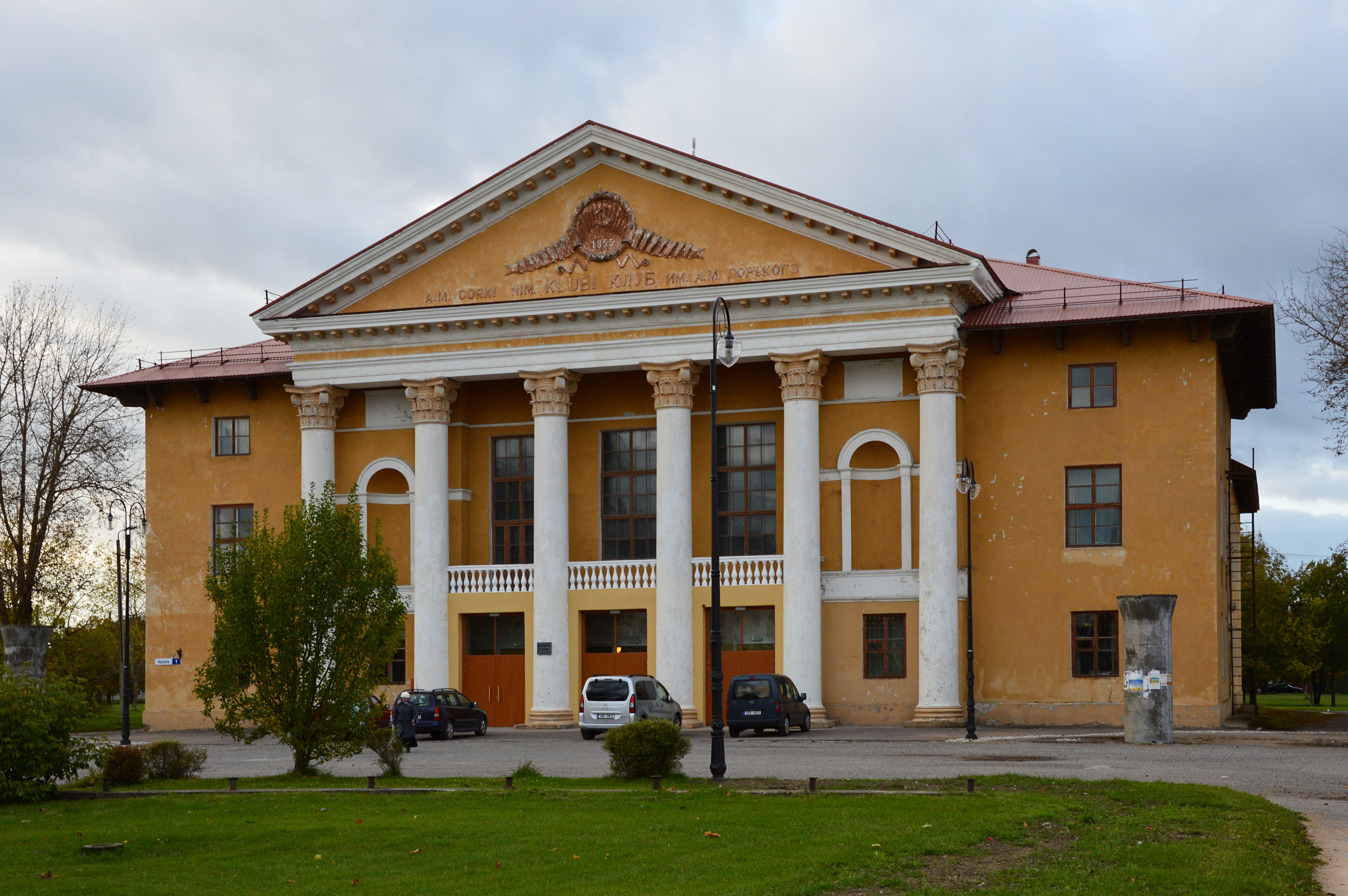 Sompa klubihoone Kohtla-Järvel.